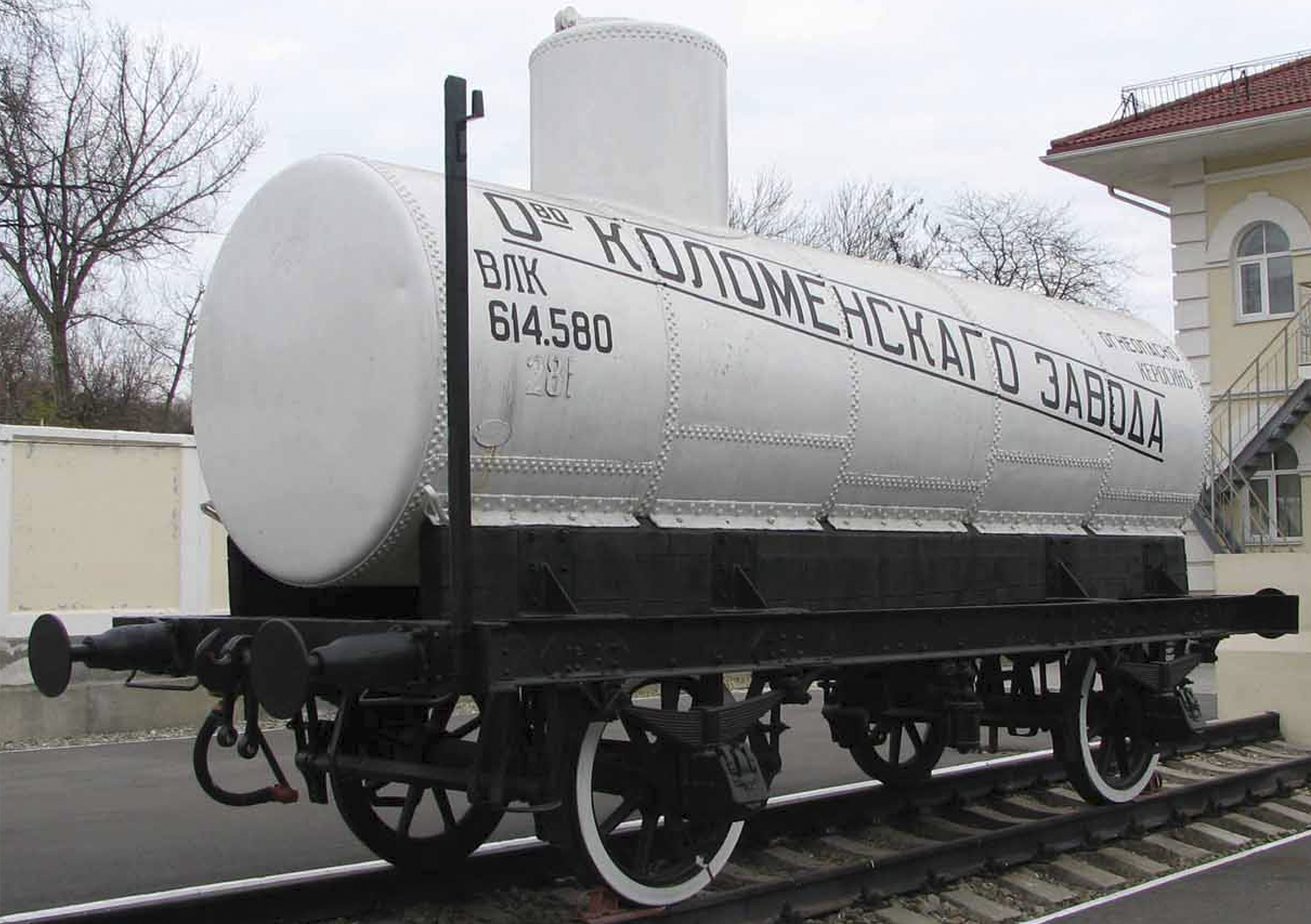 Цистерна построена в 1900-х годах